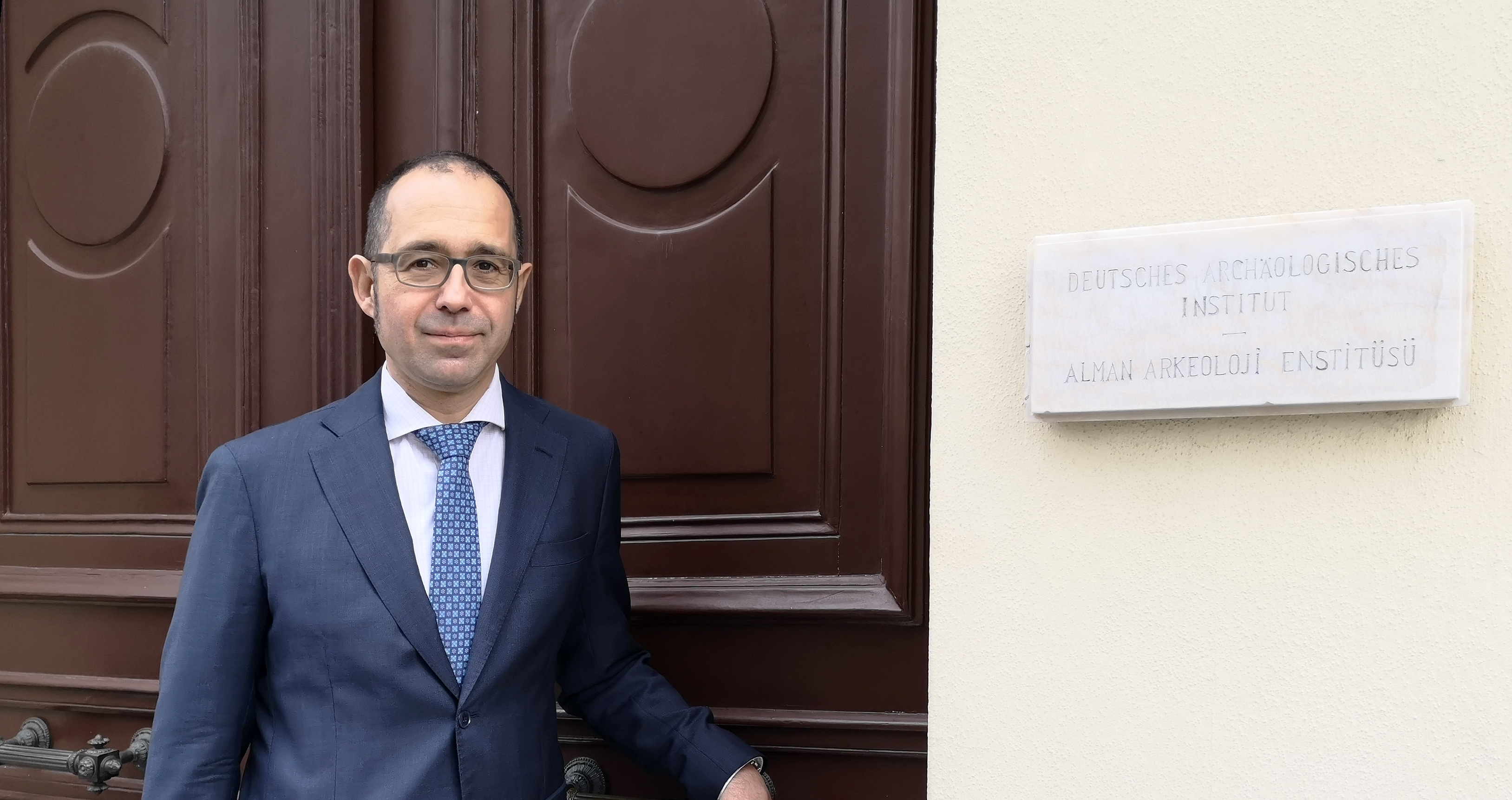 Felix Pirson, Direktor des Deutsches Archäologisches Institut Istanbul